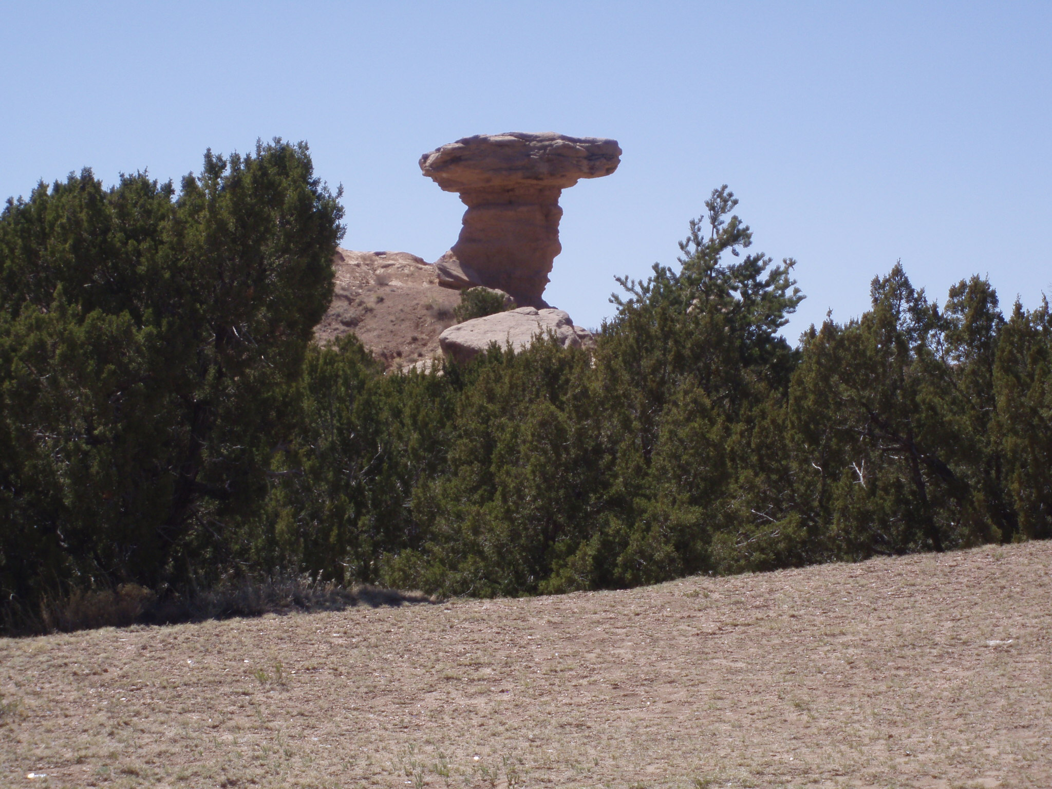 Camel Rock, at Tesuque Pueblo, in New Mexico.